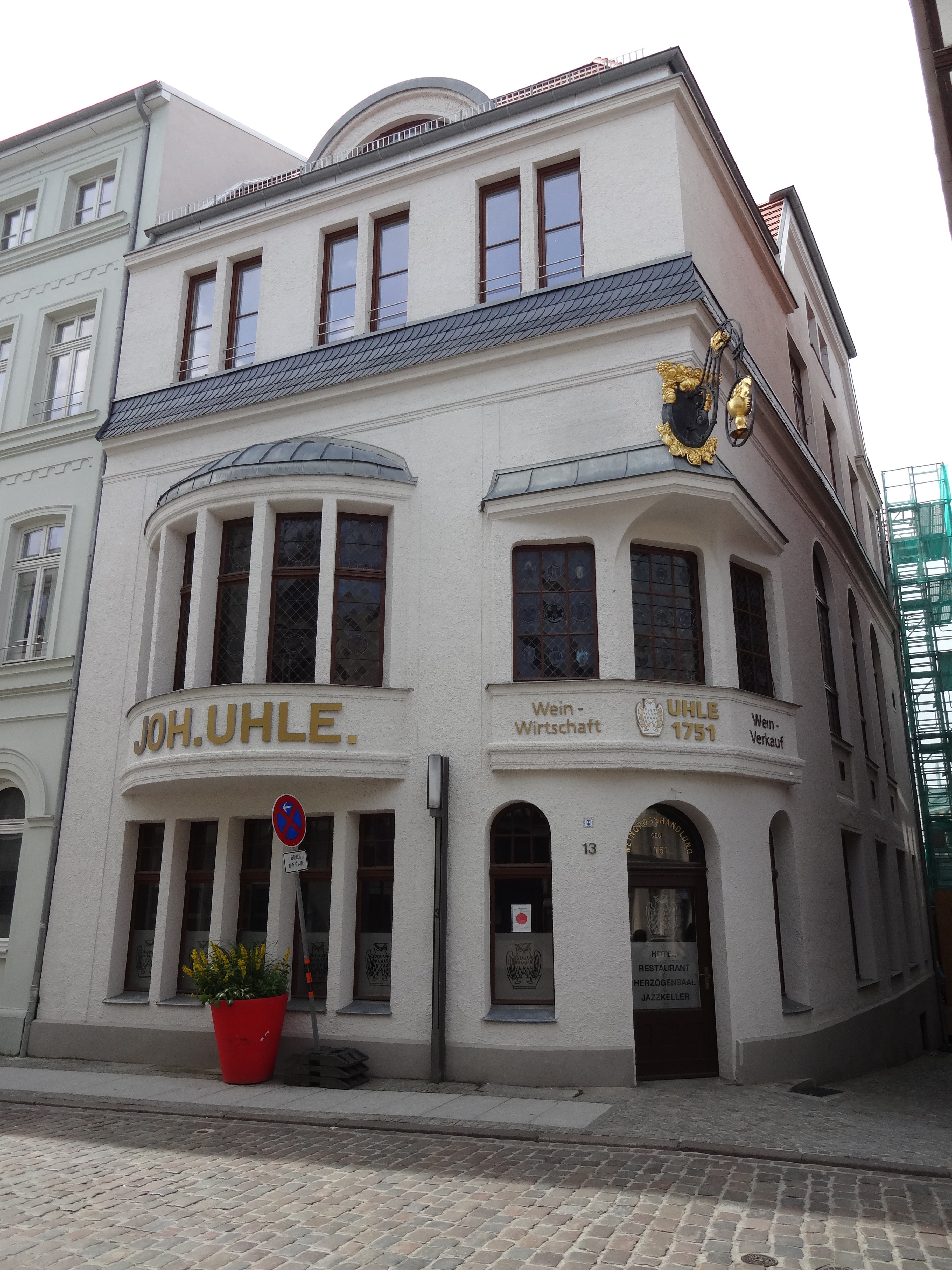 Denkmalgeschützte Gaststätte (Weinhaus Uhle) in der Schusterstraße 15, Ecke 1. Enge Straße 8 in Schwerin, in Mecklenburg-Vorpommern